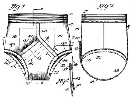 Rrojekt slipów z 1934 roku